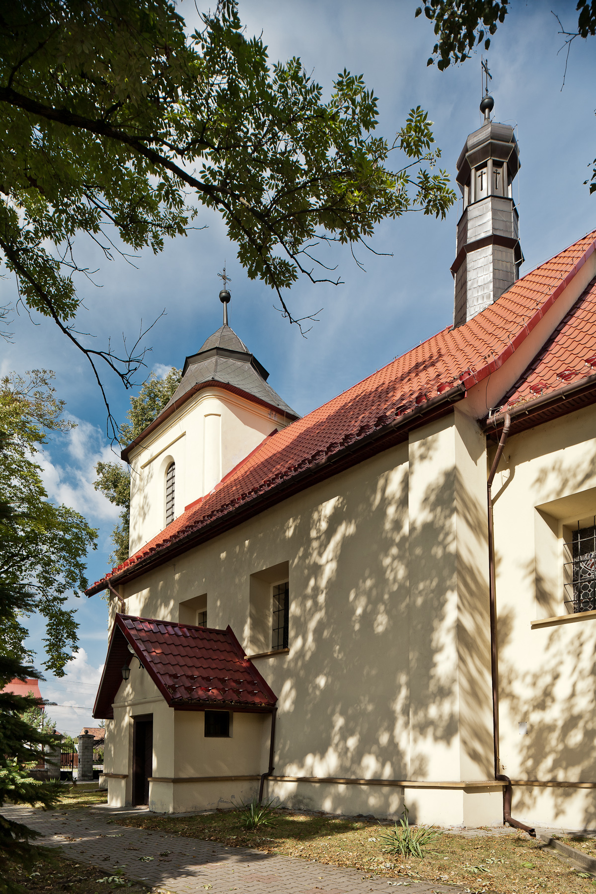 Kościół par. p.w. św. Wawrzyńca, Goszcza - boczna elewacja